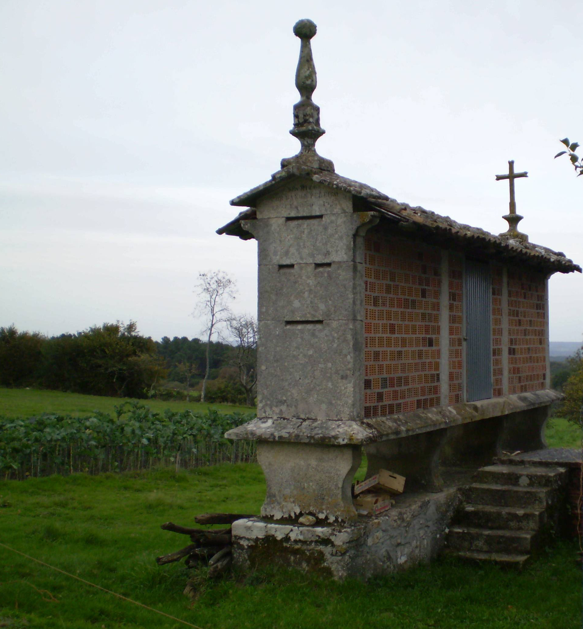 Fermoso prototipo de hórreo tipo mahía, sobre soleira para darlle horizontalidade e cepas copiformes. Presenta lampión fusiforme e cruz latina. Escaleiras de acceso laterais. Como unha boa parte dos hórreos da zona, a madeira lateral foi, infelizmente, substituída por ladrillos. Este exemplar está ubicado no lugar de A Fraga, na parroquia de Arcos (moi perto do Centro Xeográfico de Galicia), concello de Antas de Ulla